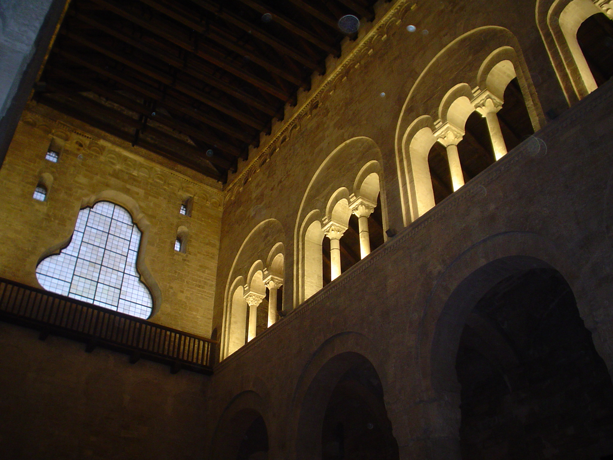 Navata centrale con evidenti i matronei e trifore